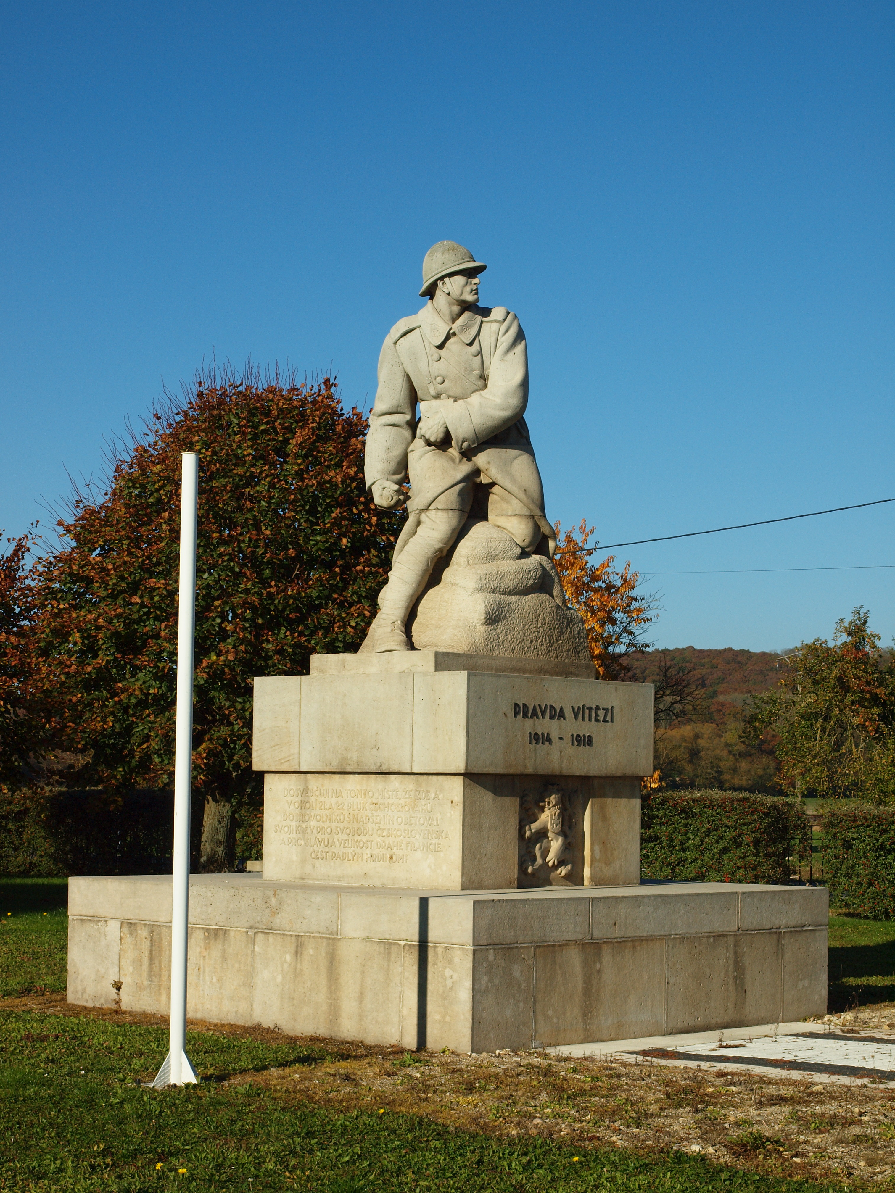 Monument de la Légion Tchécoslovaque à la Ferme de Bobot à Chestres (Vouziers, Ardennes, France)